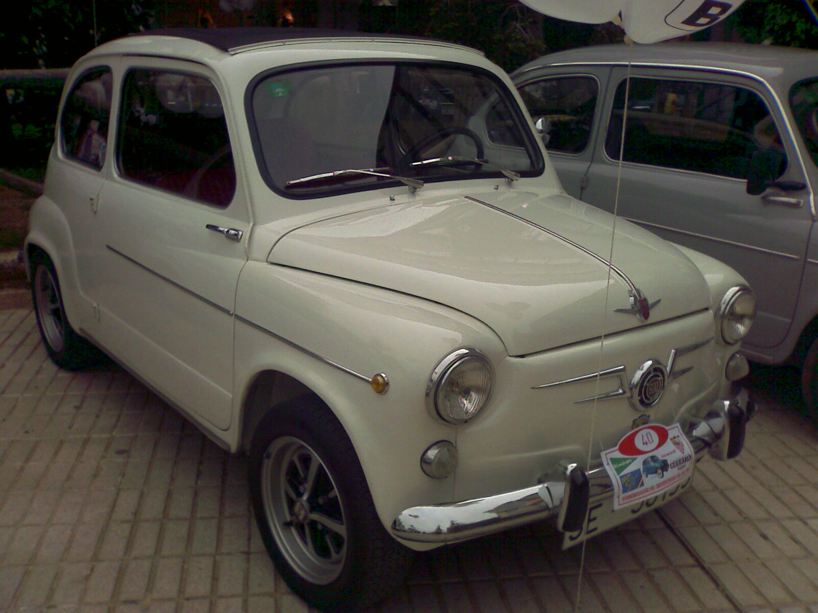 Seat 600 de las primeras producciones, con la puerta que abre desde adelante